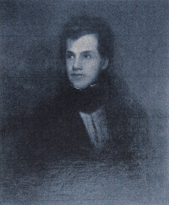 Джозеф Колман Харт